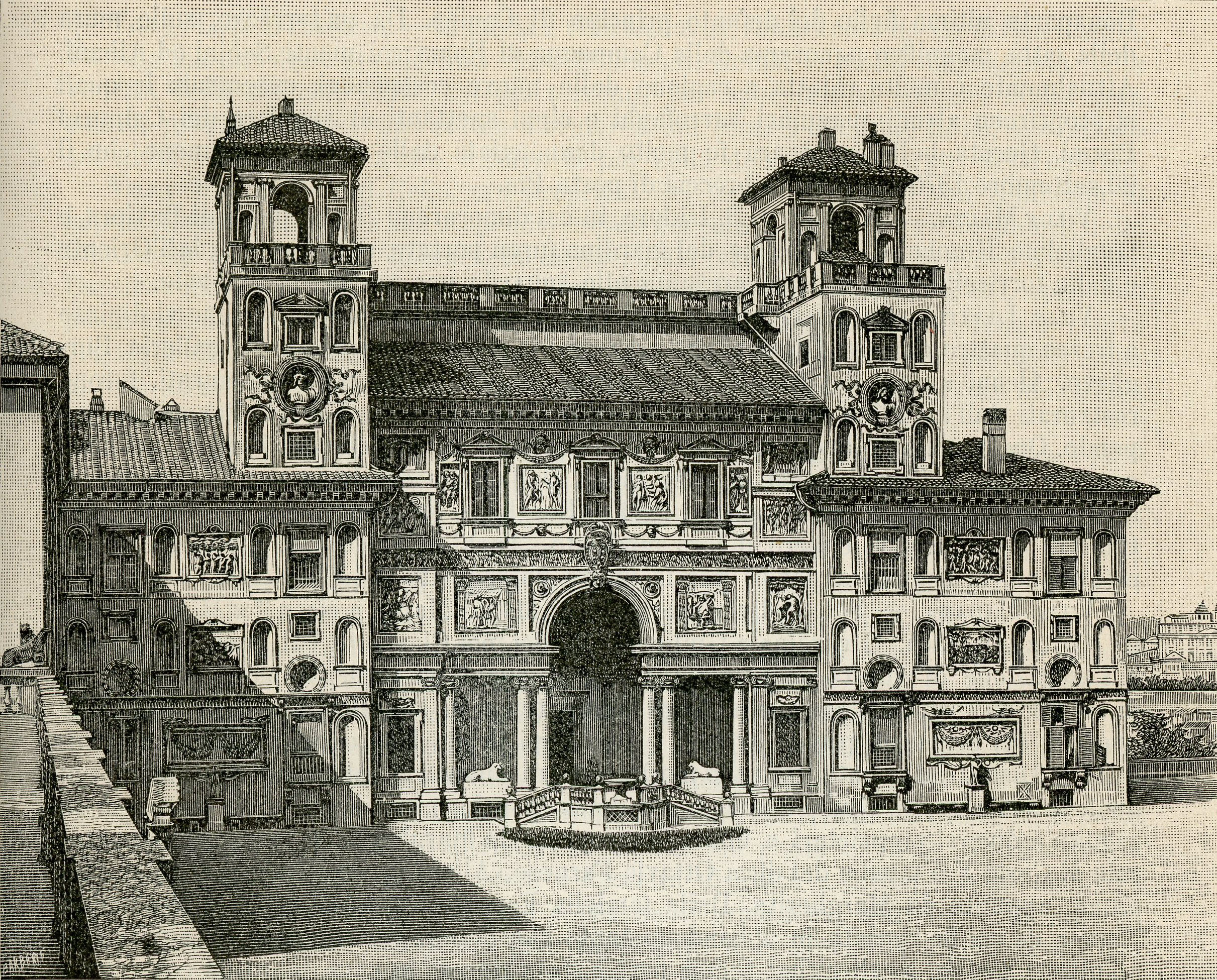 Roma: villa Medici, ora Palazzo dell’Accademia di Francia (xilografia).